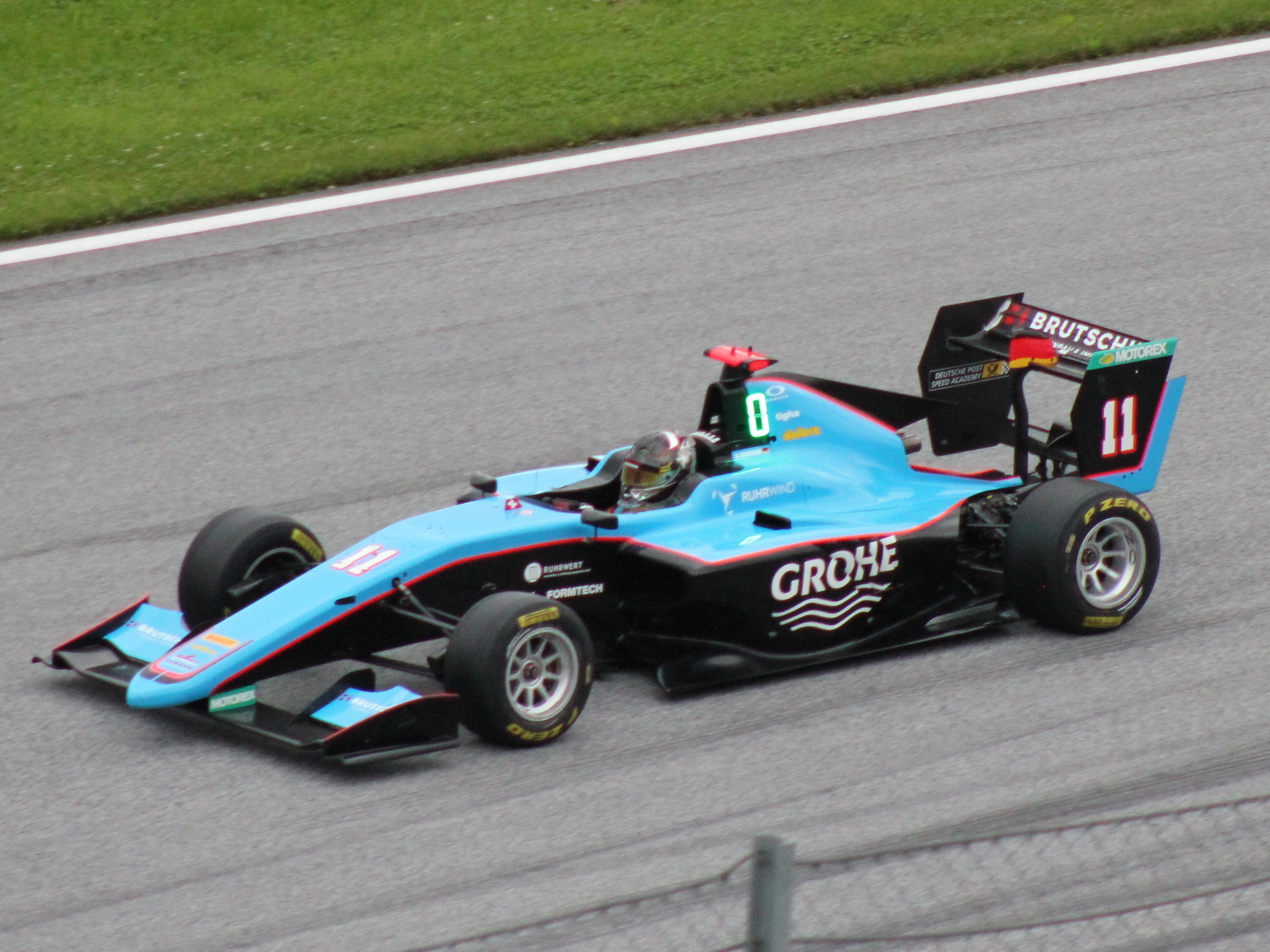 11 David Beckmann beim Rennwochenende in Österreich 2018